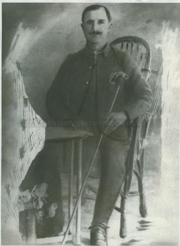 Димитър Симирданов